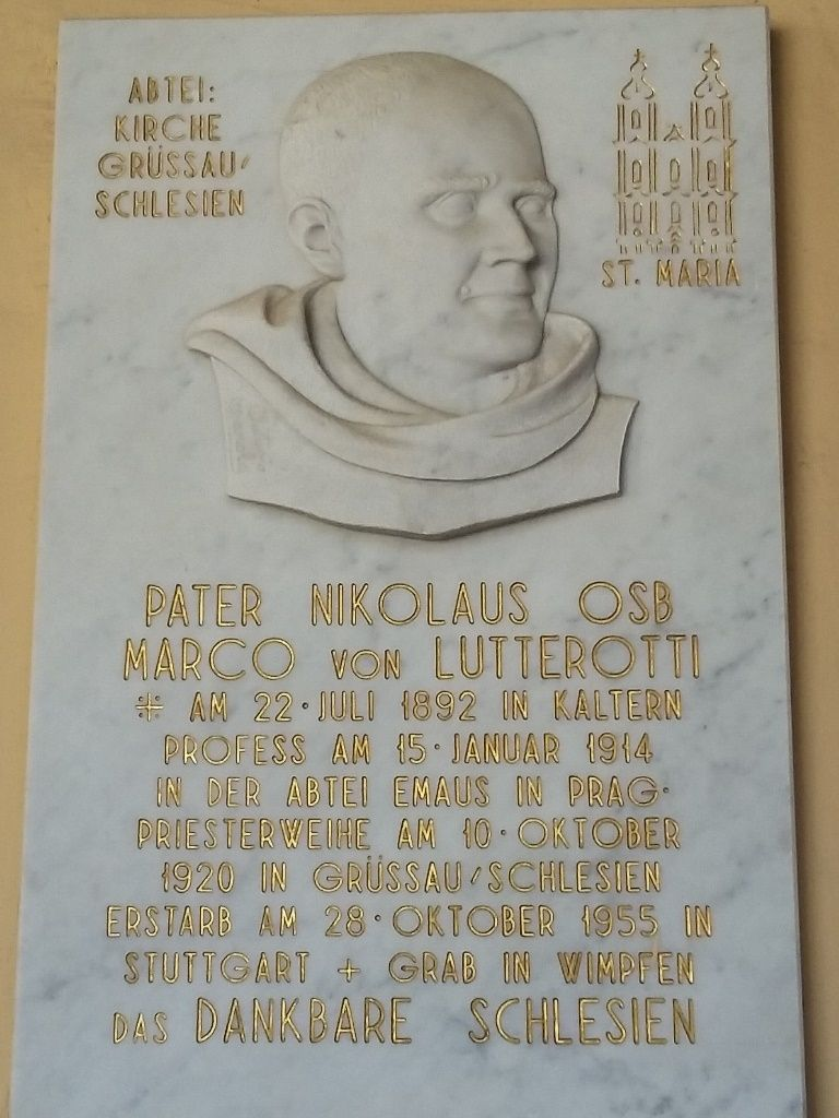 Gedenktafel für Nikolaus von Lutterotti bei der Familiengrabstätte der Familie von Lutterotti am Friedhof von Kaltern